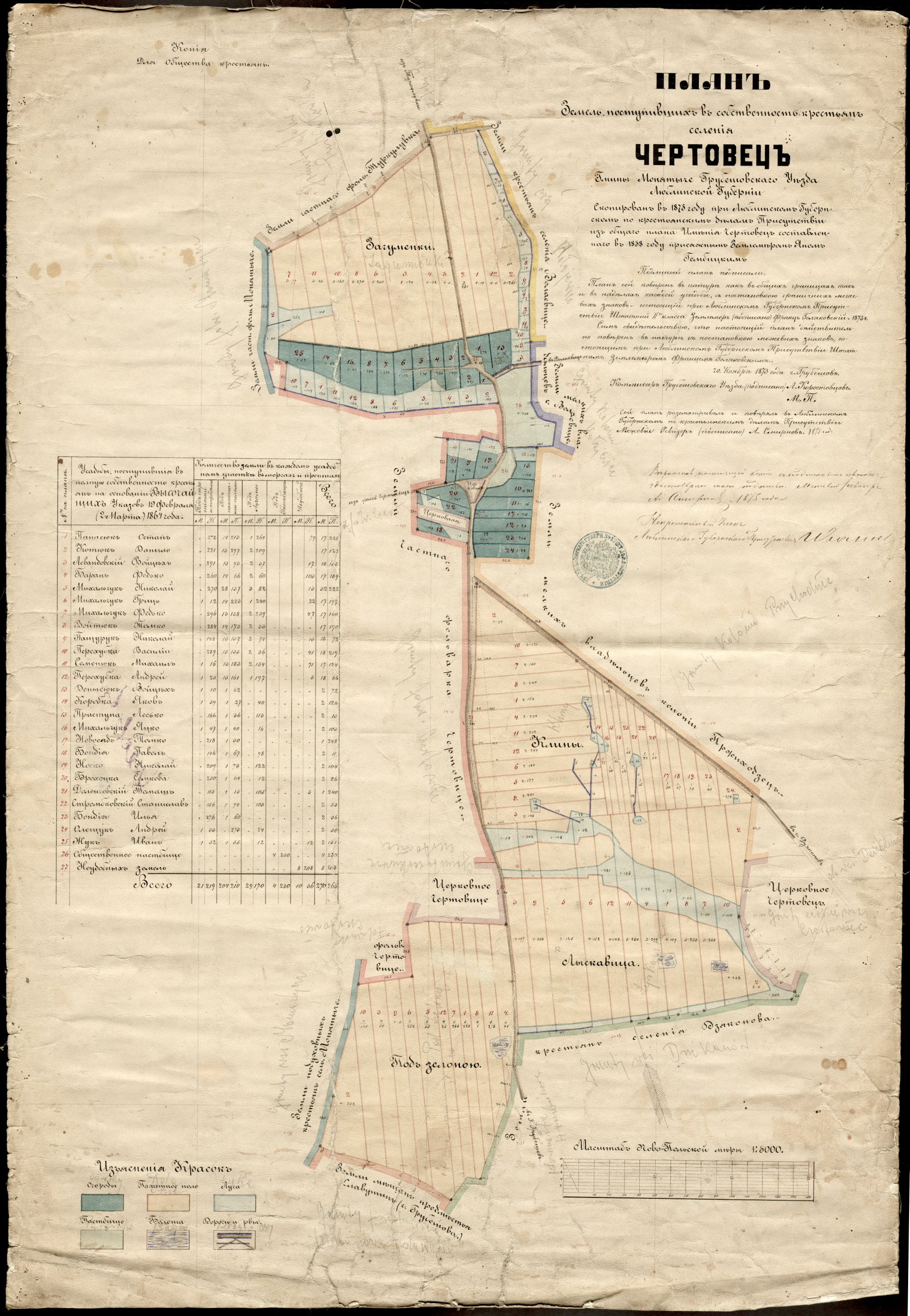 Plan Czortowic z 1858 roku skopiowany w 1875 roku